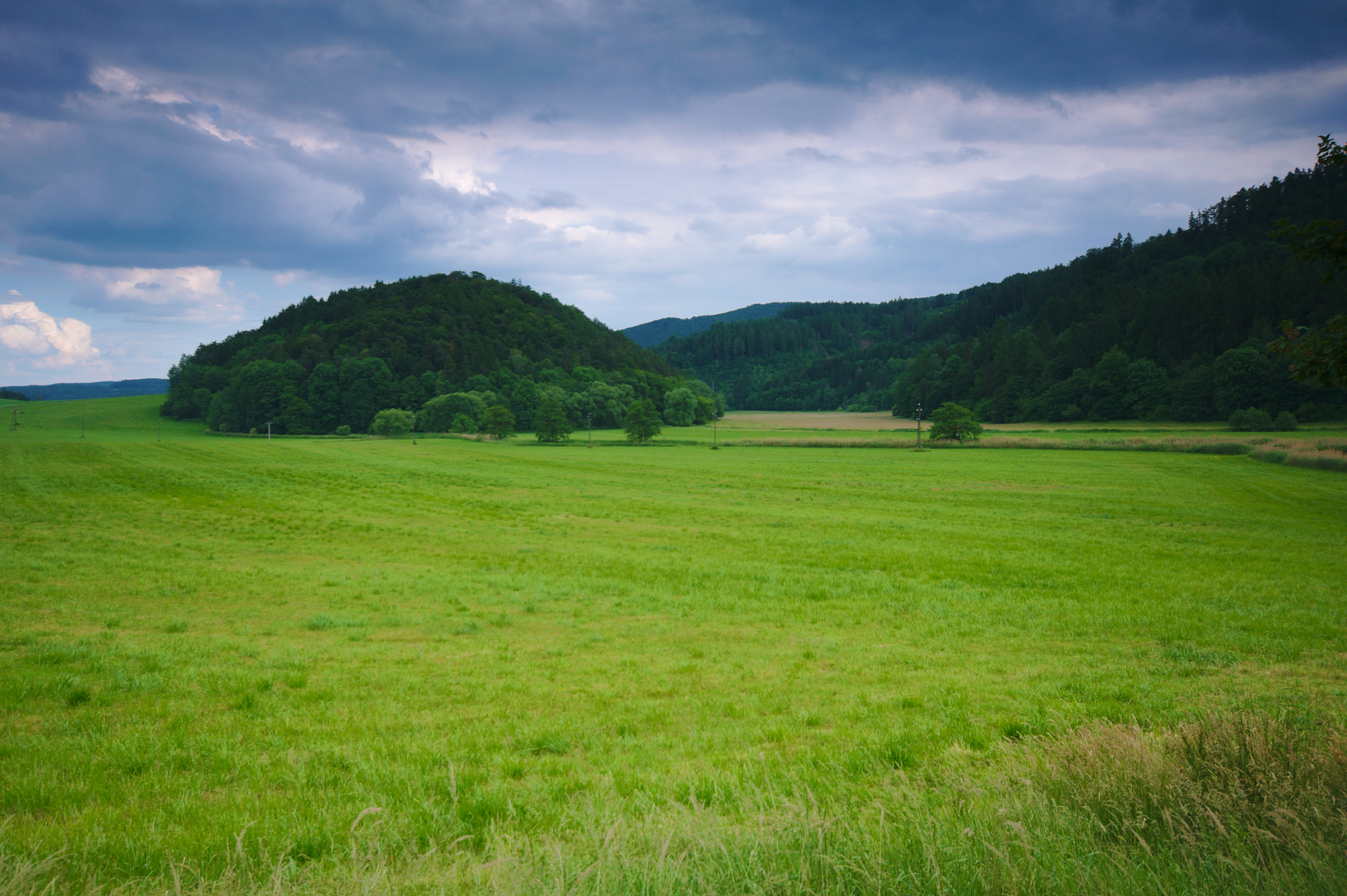 Vraní Hora, Vranová, Vranová Lhota, okres Svitavy